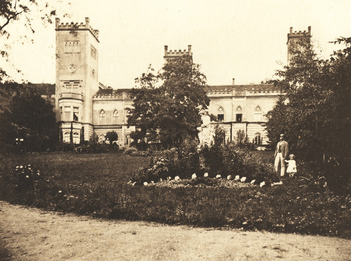 Das Keppschloss in Hosterwitz bei Dresden.